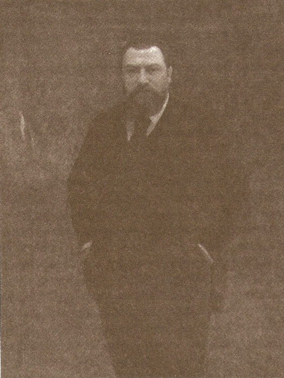 Alfred Riom (1842-1908)